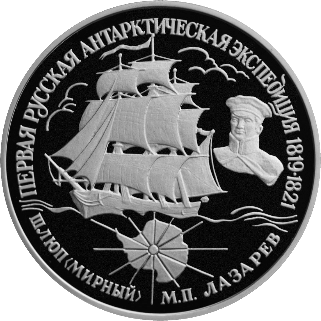 Монета Банка России — «Географическая серия», Первая русская антарктическая экспедиция, Шлюп «Мирный», 25 рублей, реверс